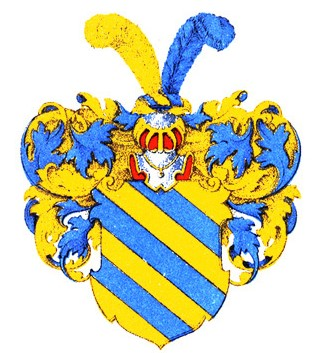 Nierothi suguvõsa aadlivapp